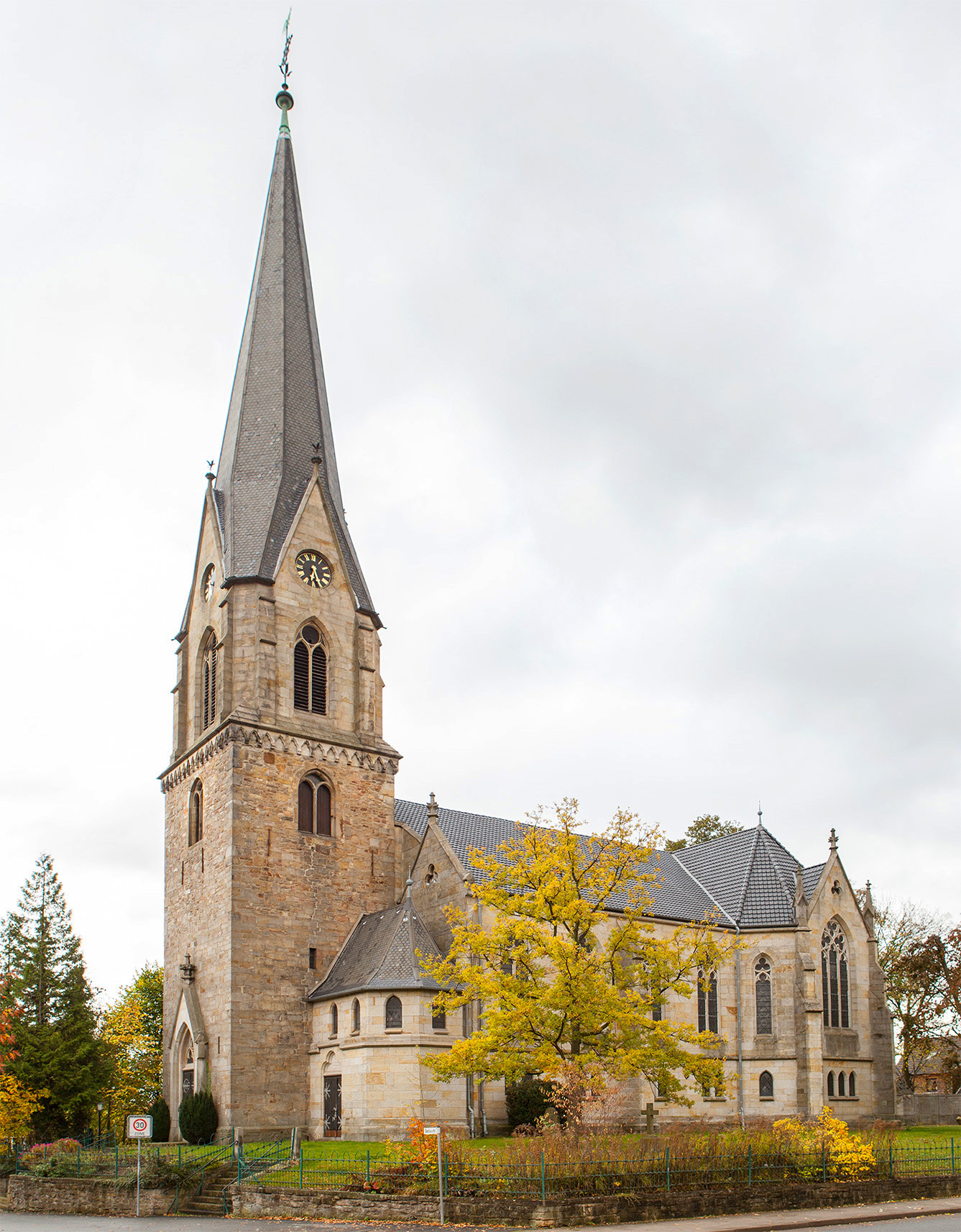 Kleinenbremen, Evangelische Pfarrkirche This is the photograph of an architectural monument. It is part of the list of cultural monuments of Porta Westfalica, no. 0099